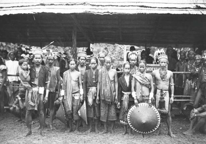 Foto. Een groep Moealang Dajaks tijdens het bezoek van Gouverneur-Generaal J.P. Graaf van Limburg Stirum aan Borneo